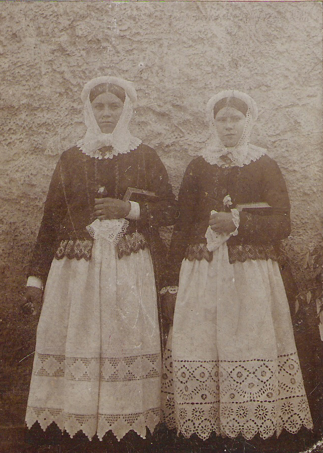 Dawne stroje ludowe z okolic Rydzyny